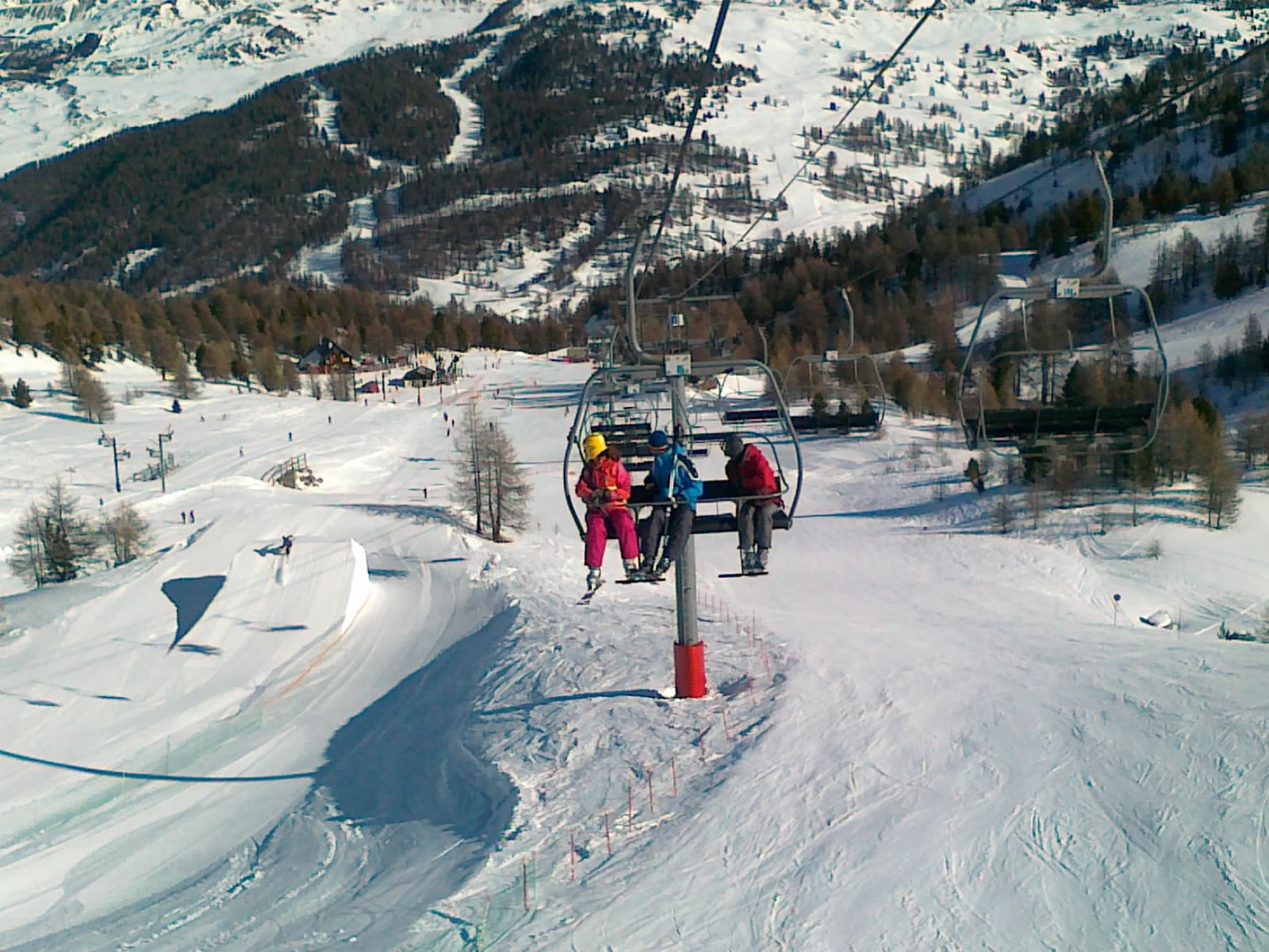 Vars, Winter 2012